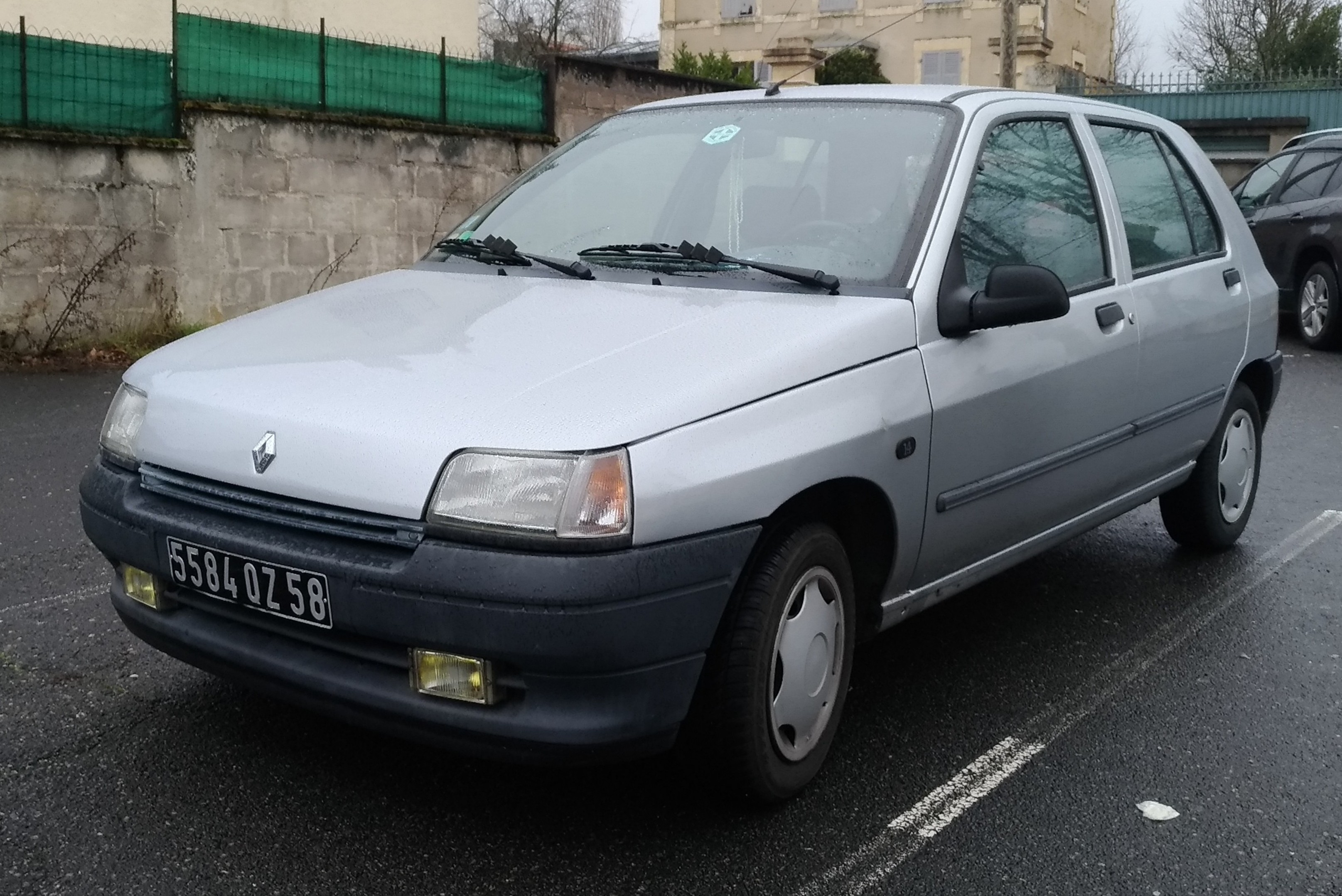 1993 Renault Clio (1.4 80 hp) at Nevers.